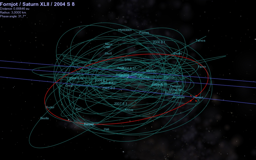 Fornjoti orbiit ümber Saturni